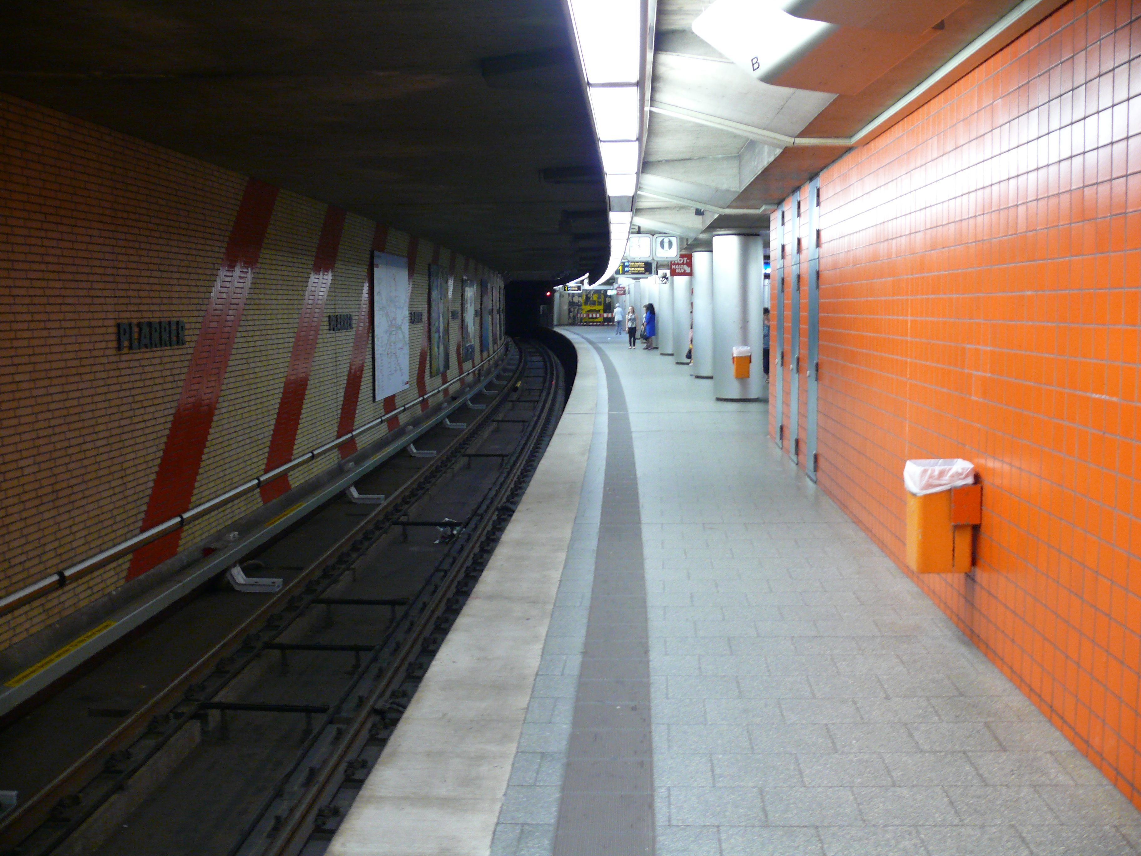 Gleis 1 am U-Bahnhof Plärrer in Nürnberg, auf der Ebene -2.